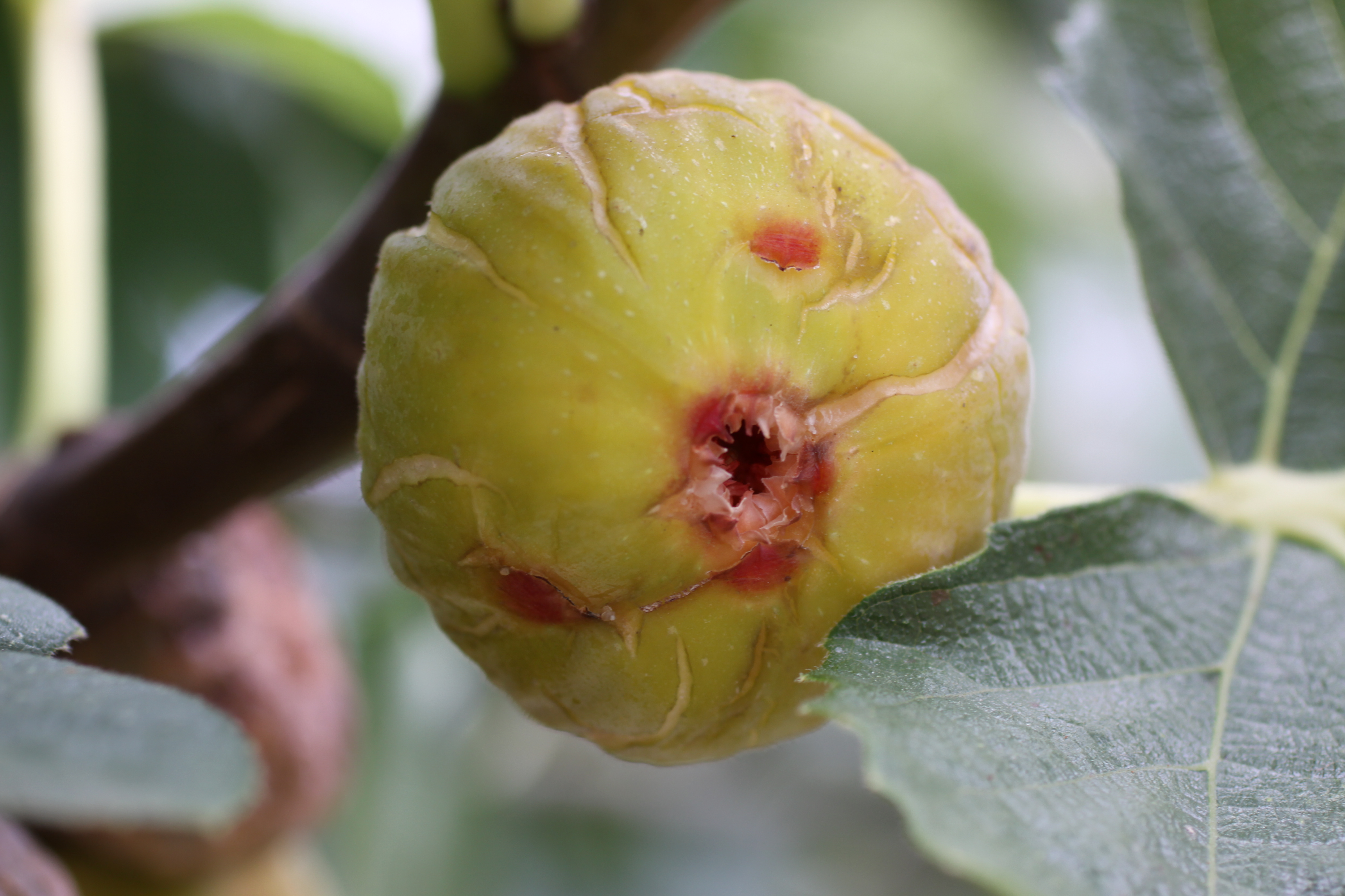 Une figue mûre sur un figuier (Ficus carica) dans un jardin à La Rochelle (Charente-Maritime, France).